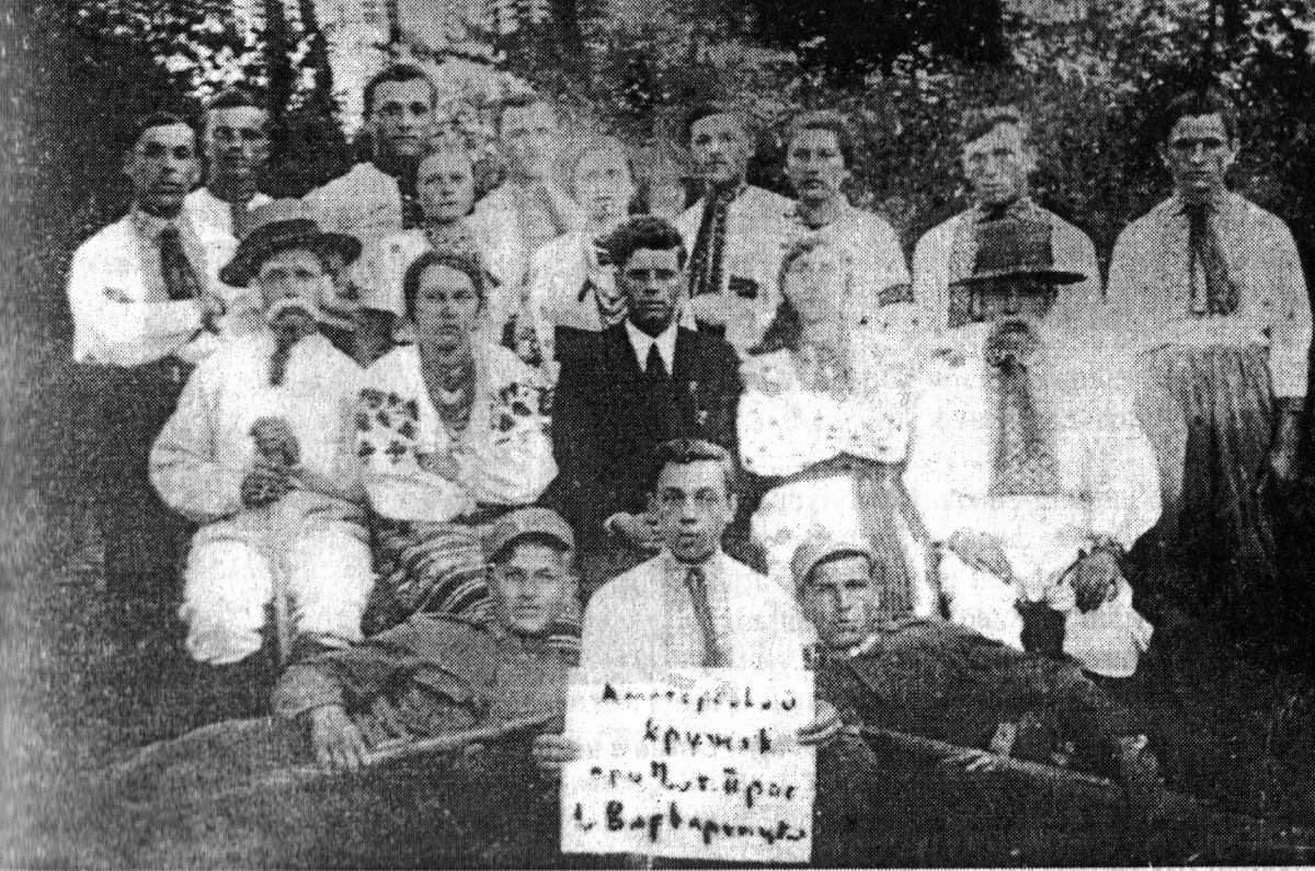 Селяни села Варваринці, 1930-ті